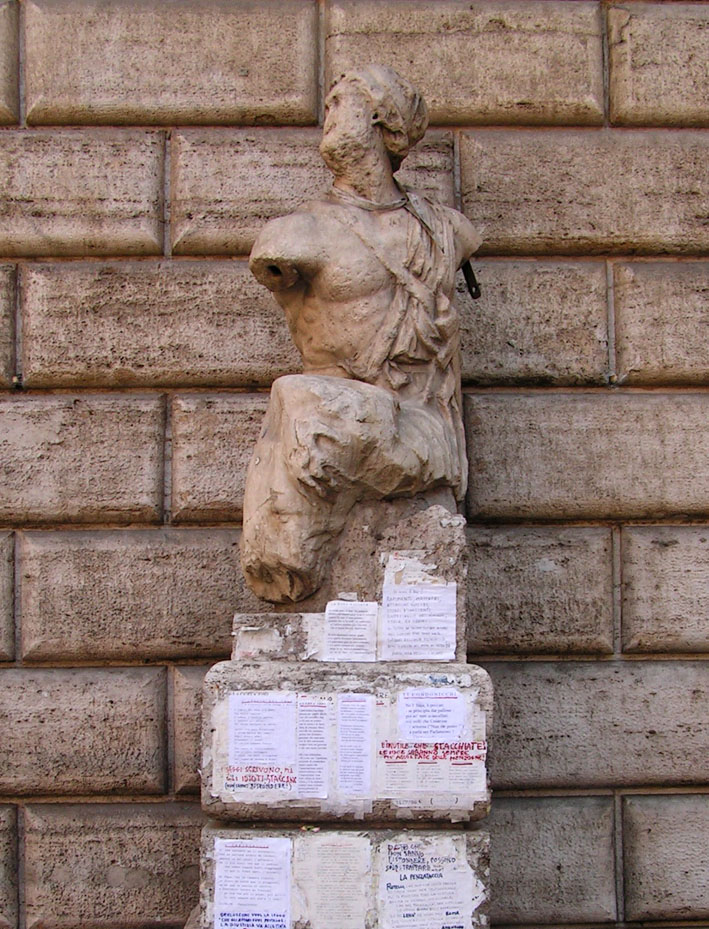 Pasquino Rome